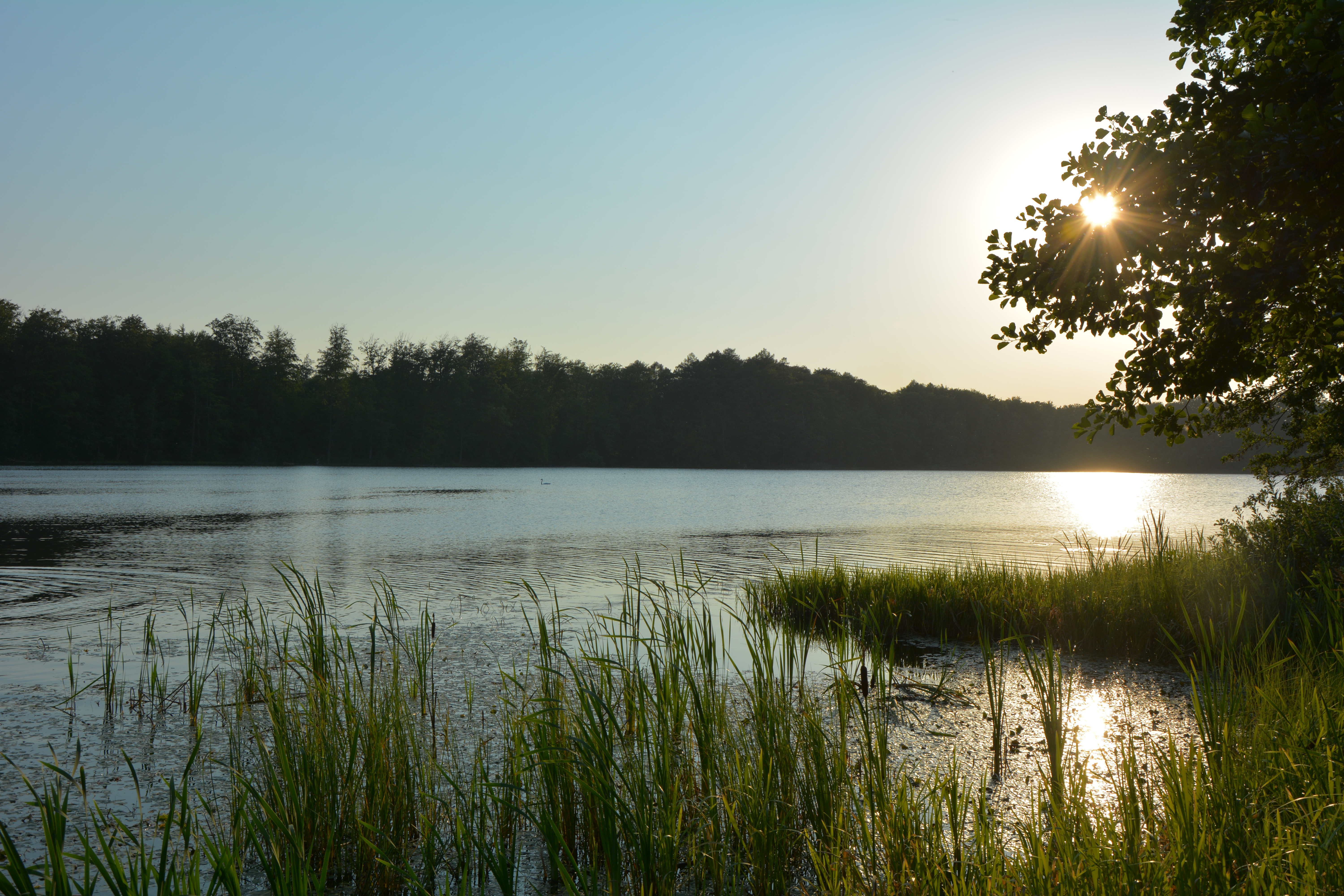 Widok na Jezioro Leśne od strony kąpieliska.